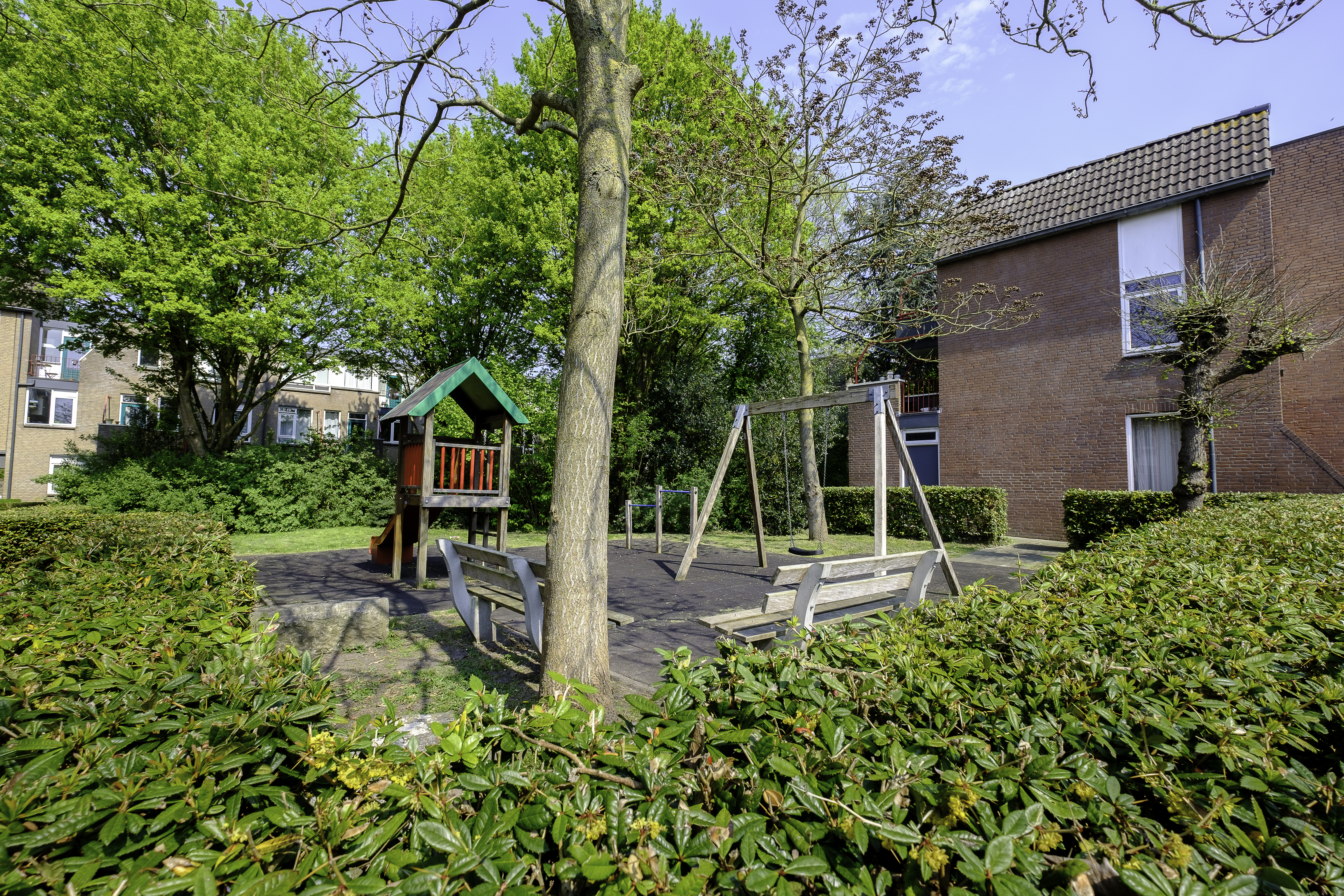 Speeltuin in de Davidstraat